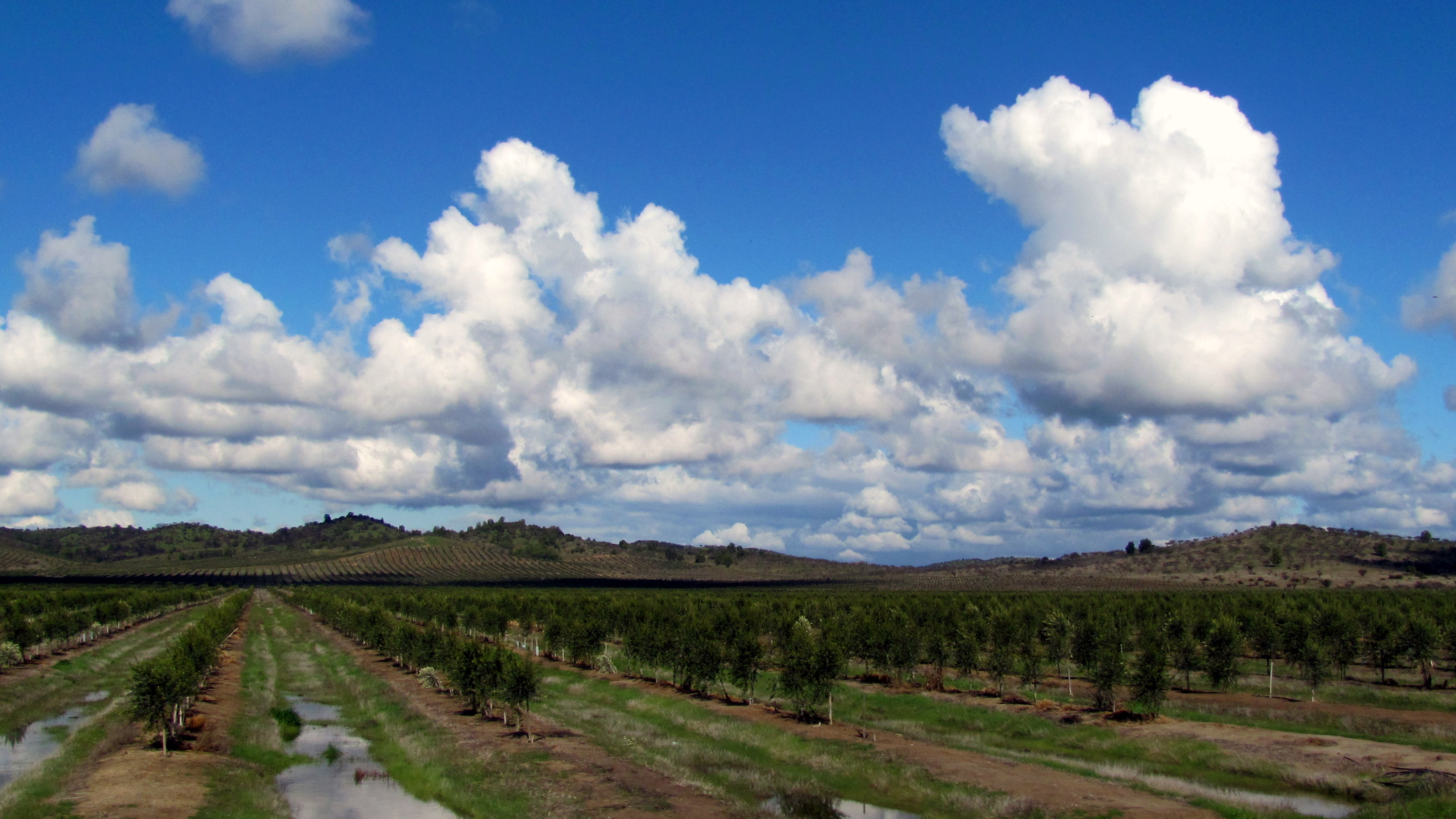 Paredones, comuna de la VI Región de O'Higgins.